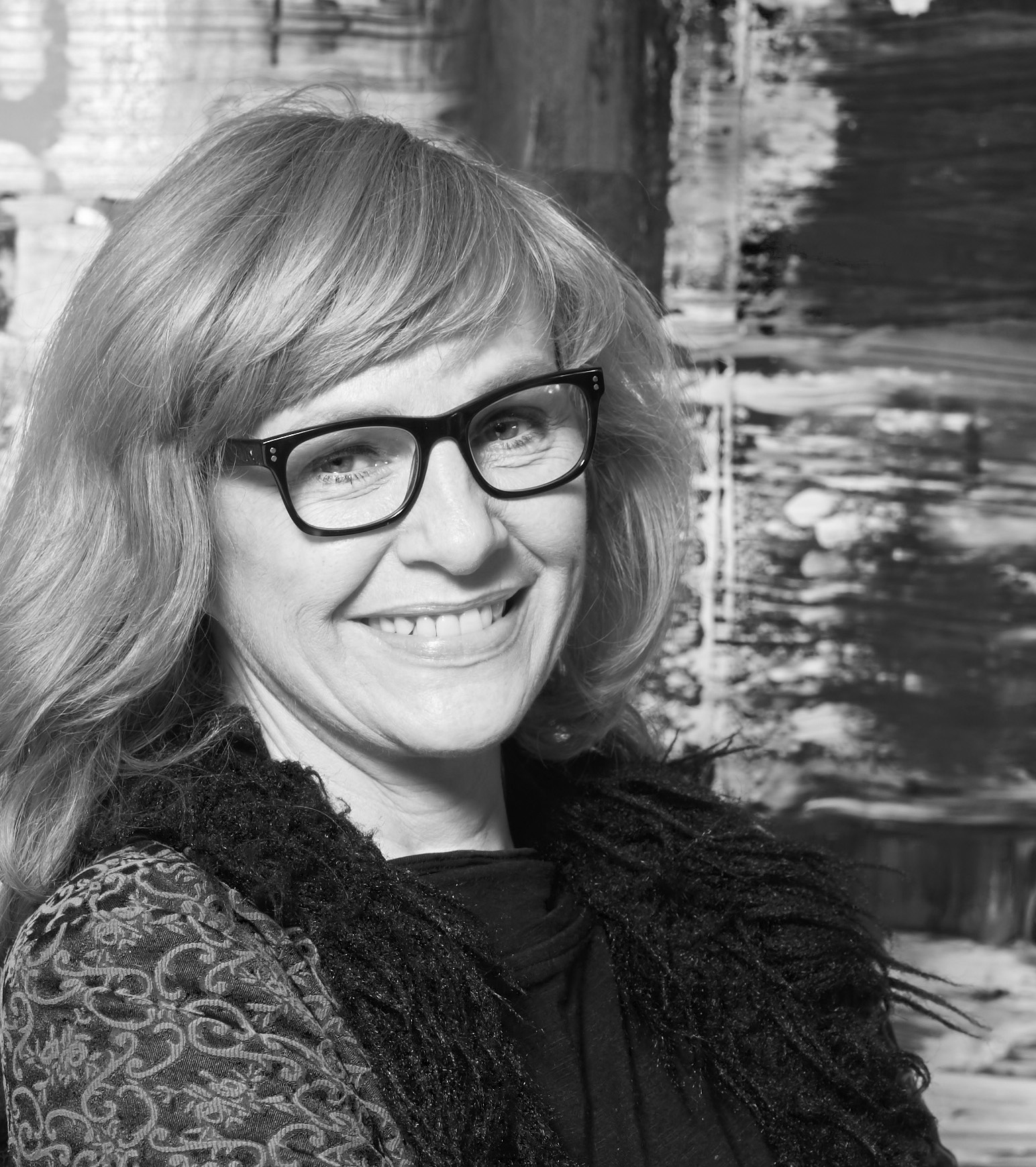 Porträt Heike Haupt 2019 (Fotografin: Monika Probst)